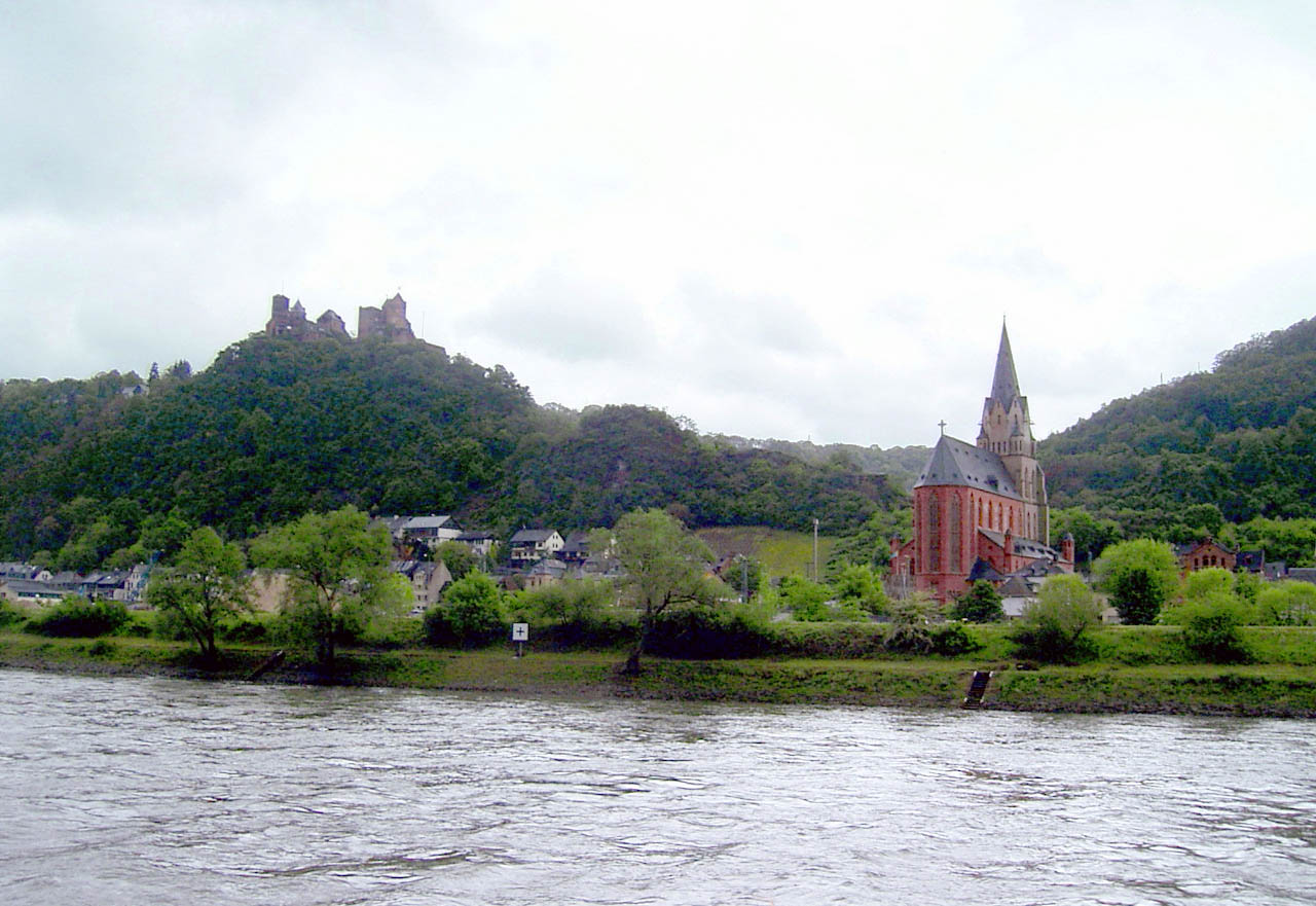 Oberwesel mit Liebfrauenkirche und Schönburg